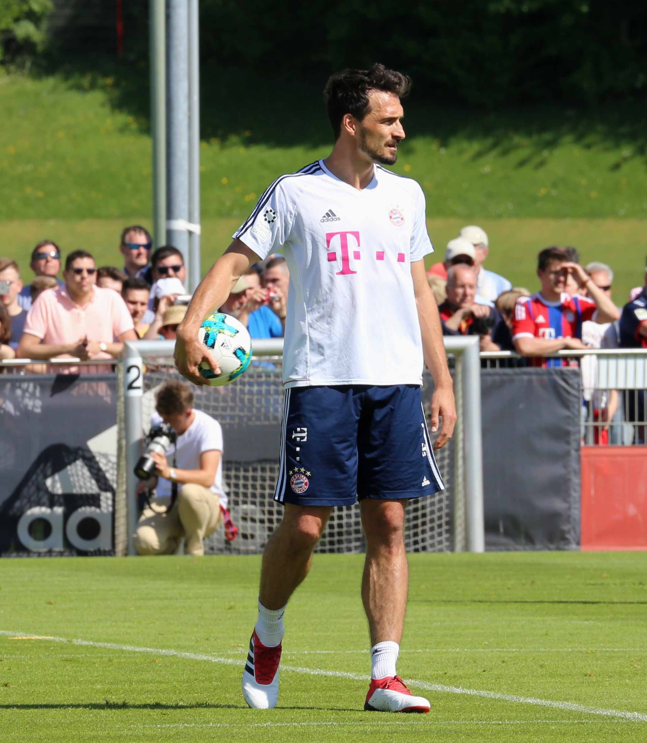 Mats Hummels, am 8. Mai 2018 beim Training auf dem Gelände des FC Bayern München